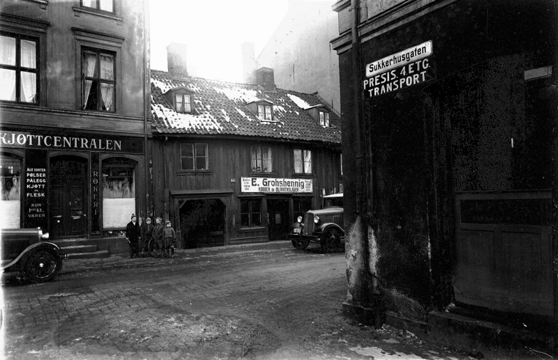 Karl den XIIs gate 28-30 ved kryss med Sukkerhusgaten på Vaterland i Oslo, 1936